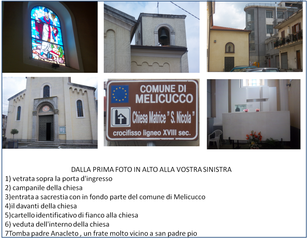 25 Aprile 2011 da suppa angela